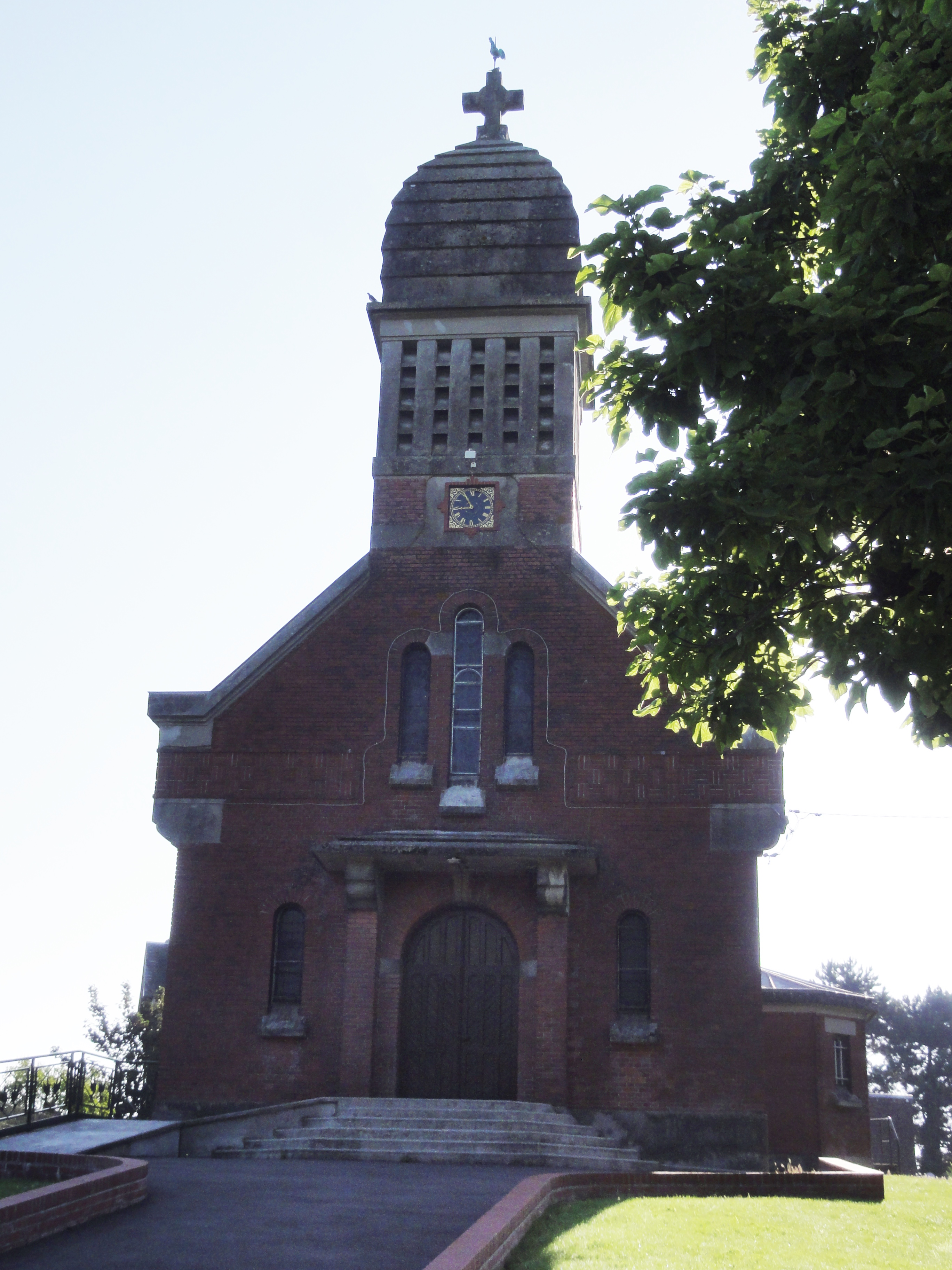 Neuville-Saint-Amand (Aisne) église